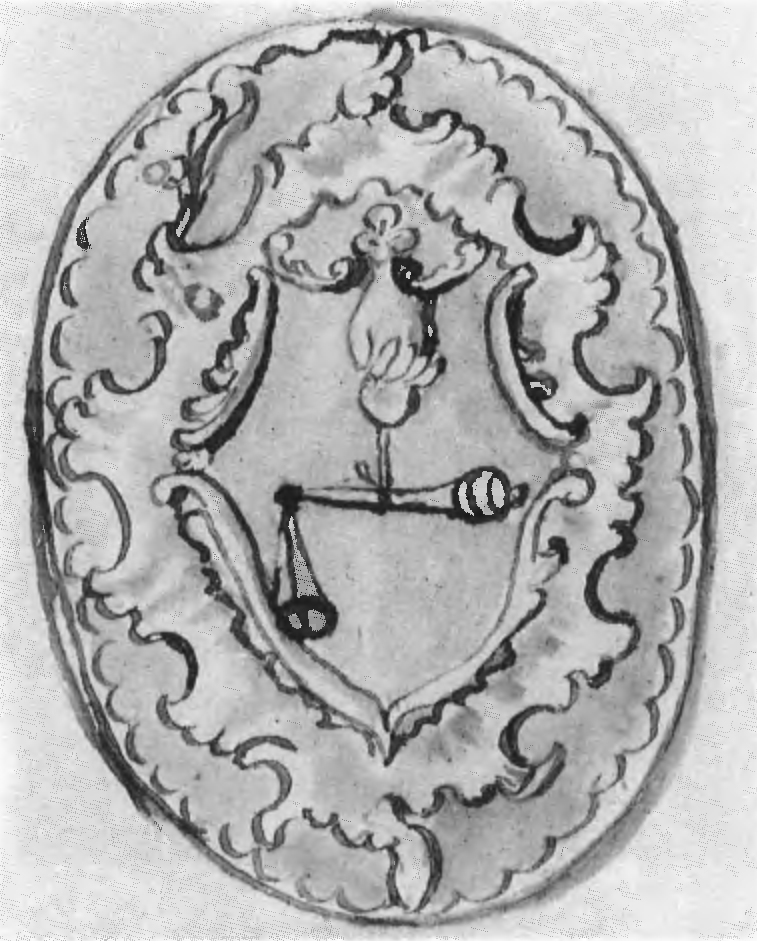 Беларуская (тарашкевіца): Шклоў (Škłoŭ). Герб места